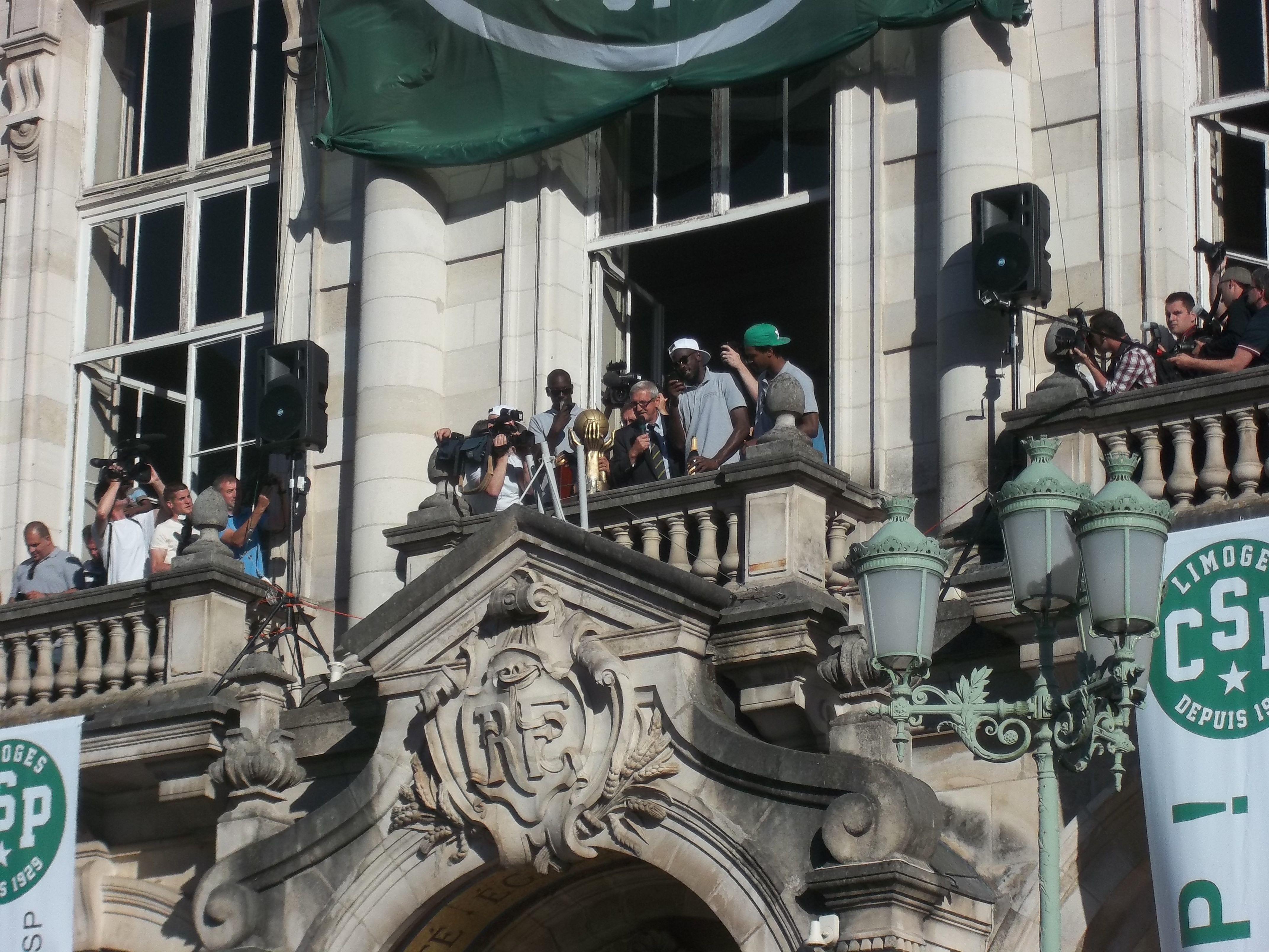 fête avec le public